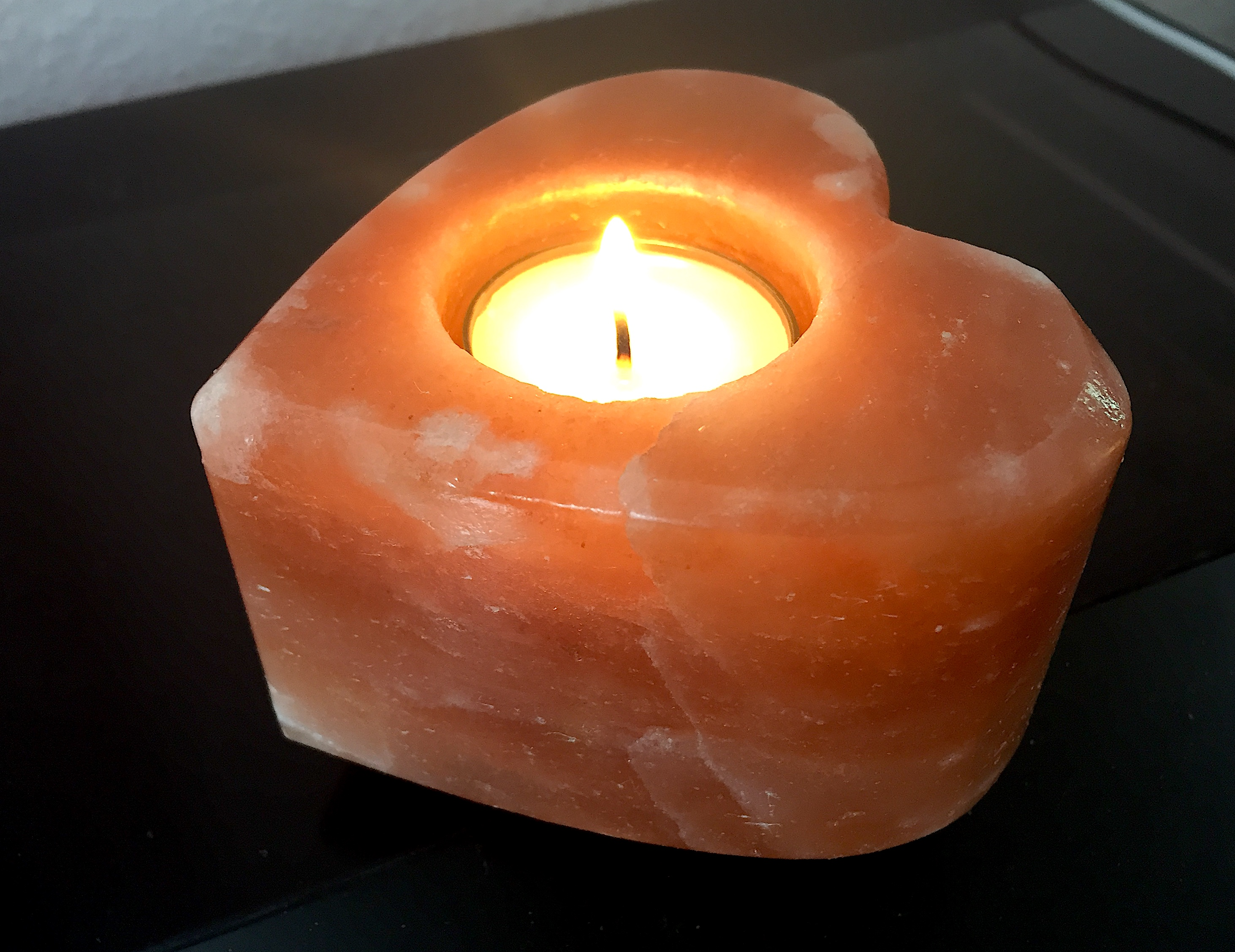 Herzförmiger Teelicht Kerzenhalter aus Himalaya Salz